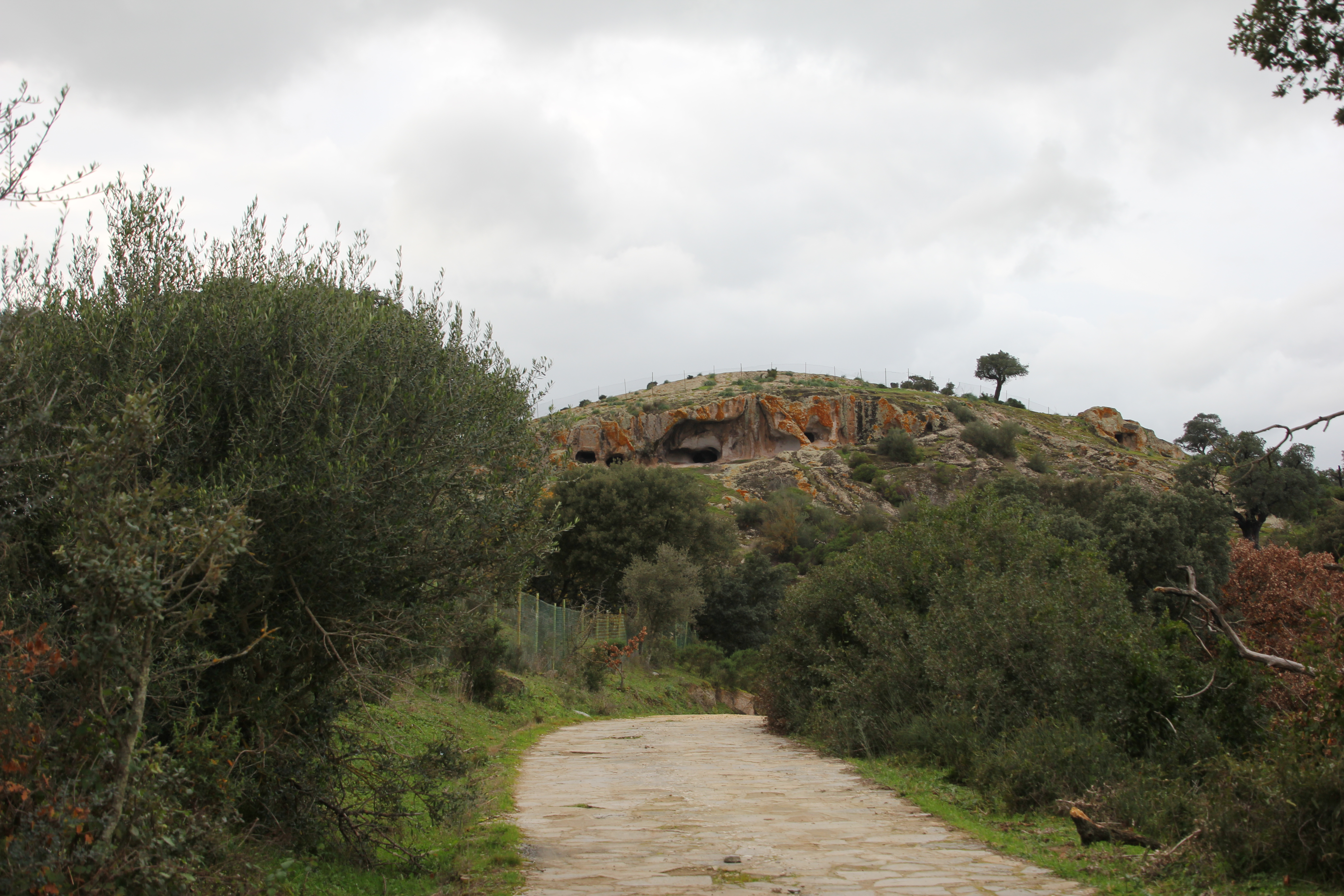 Ittireddu - Necropoli di Partulesi